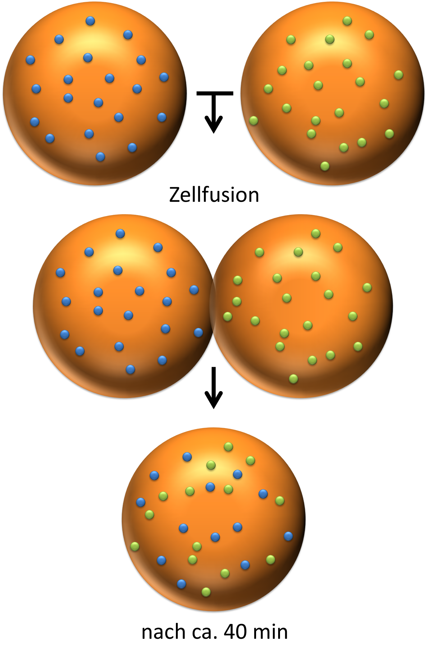 Schema des Versuchs von Frye und Edidin 1972: die Membranproteine zweier Zellen werden unterschiedlich farbig markiert, anschliessend werden die beiden Zellen fusioniert, nach ca. 40 Minuten haben sich die Membranproteine auf der neuen Zelle gleichmässig verteilt; sie müssen sich also in der Membran bewegen können (→ Fluid-Mosaic-Modell)